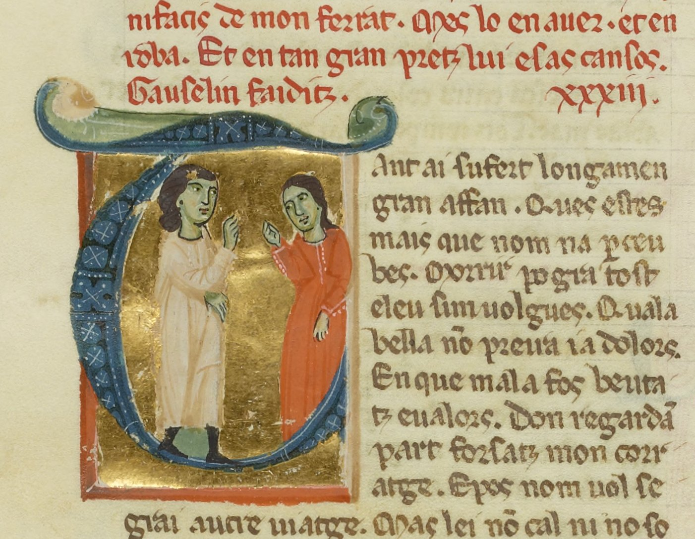 Le troubadour Gaucelm Faidit, XIIe siècle.